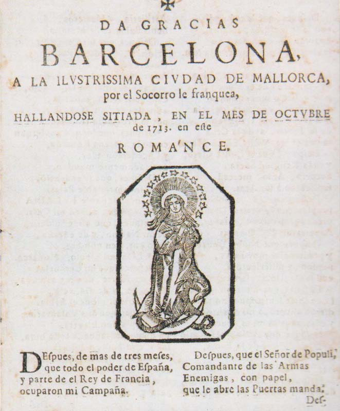 Romance. Da gracias Barcelona a la ilustrissima ciudad de Mallorca